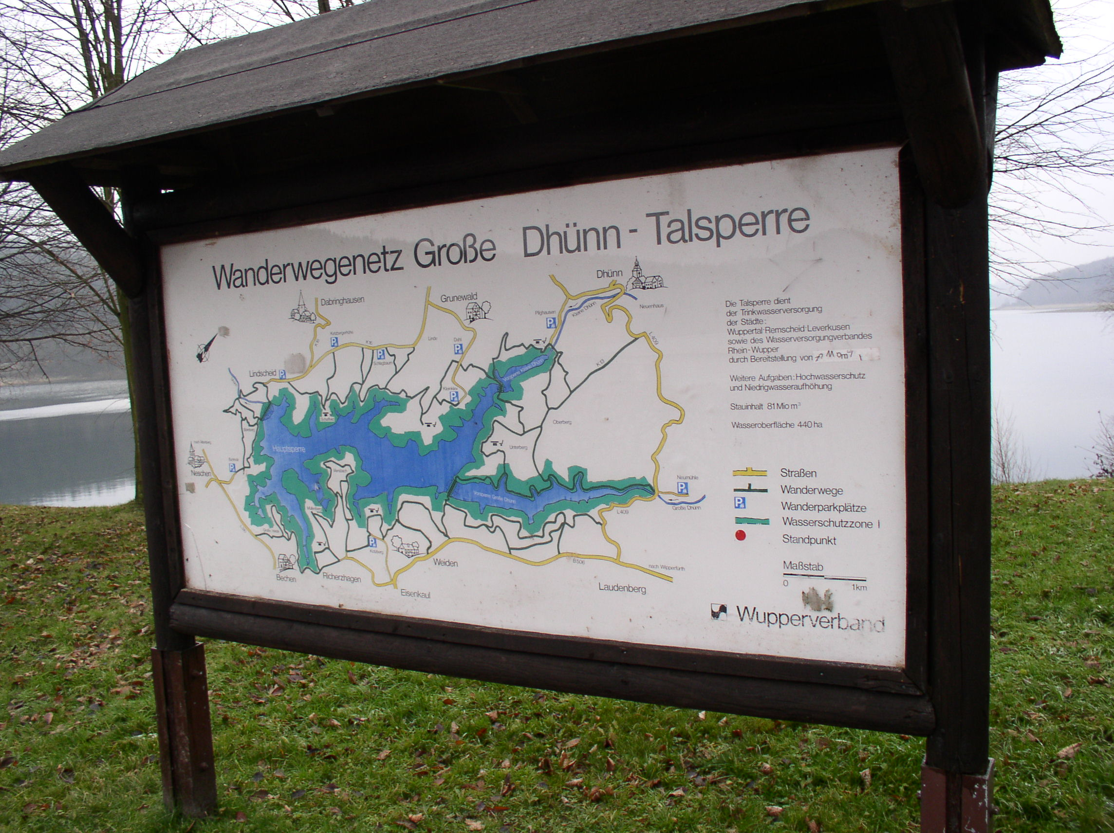 Übersichtstafel Große Dhünntalsperre, 2004 selbst fotografiert